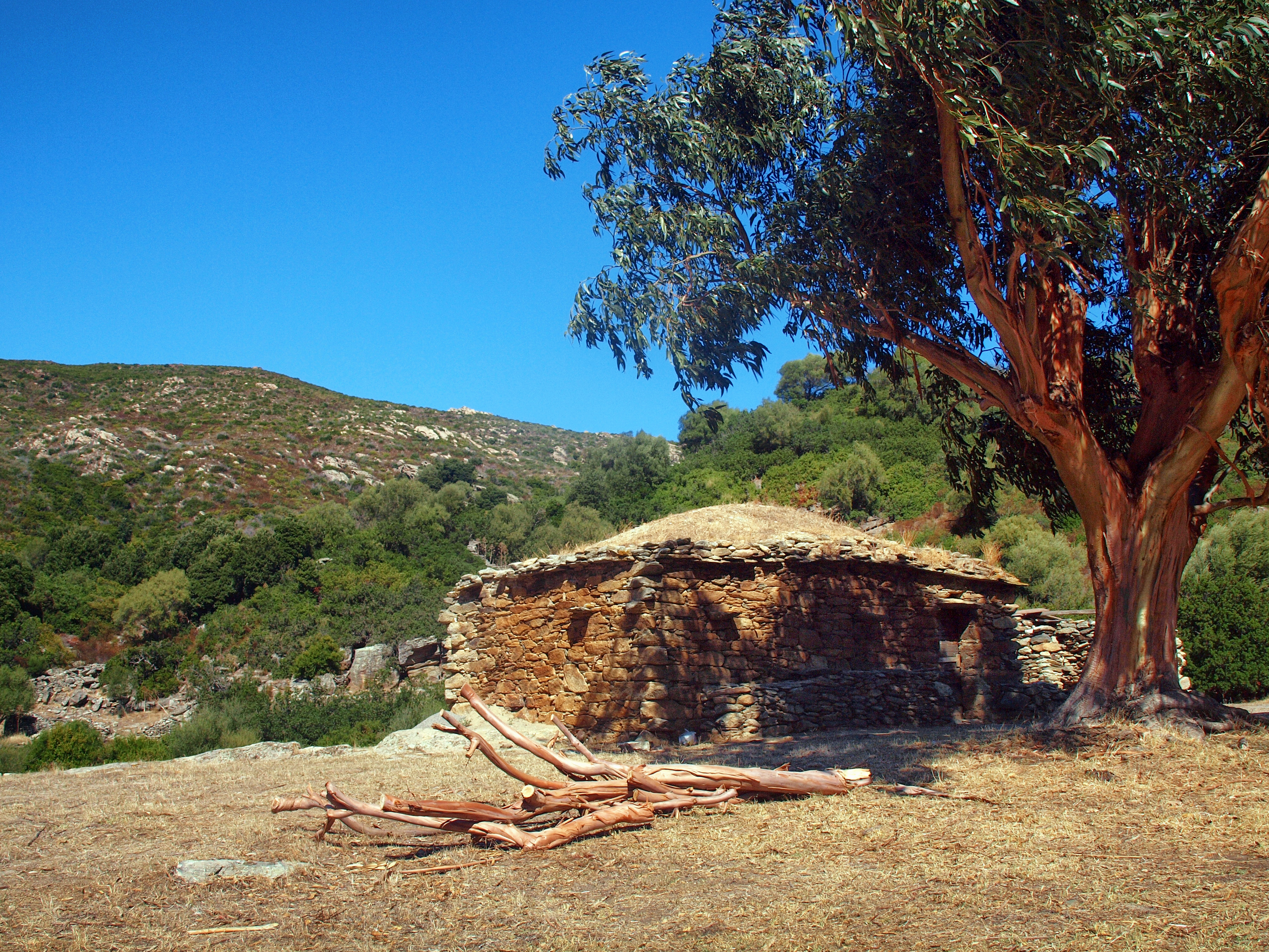 Santo-Pietro-di-Tenda, Nebbio (Corse) - Pagliaghju (en français « pailler ») à l'est du Désert des Agriates